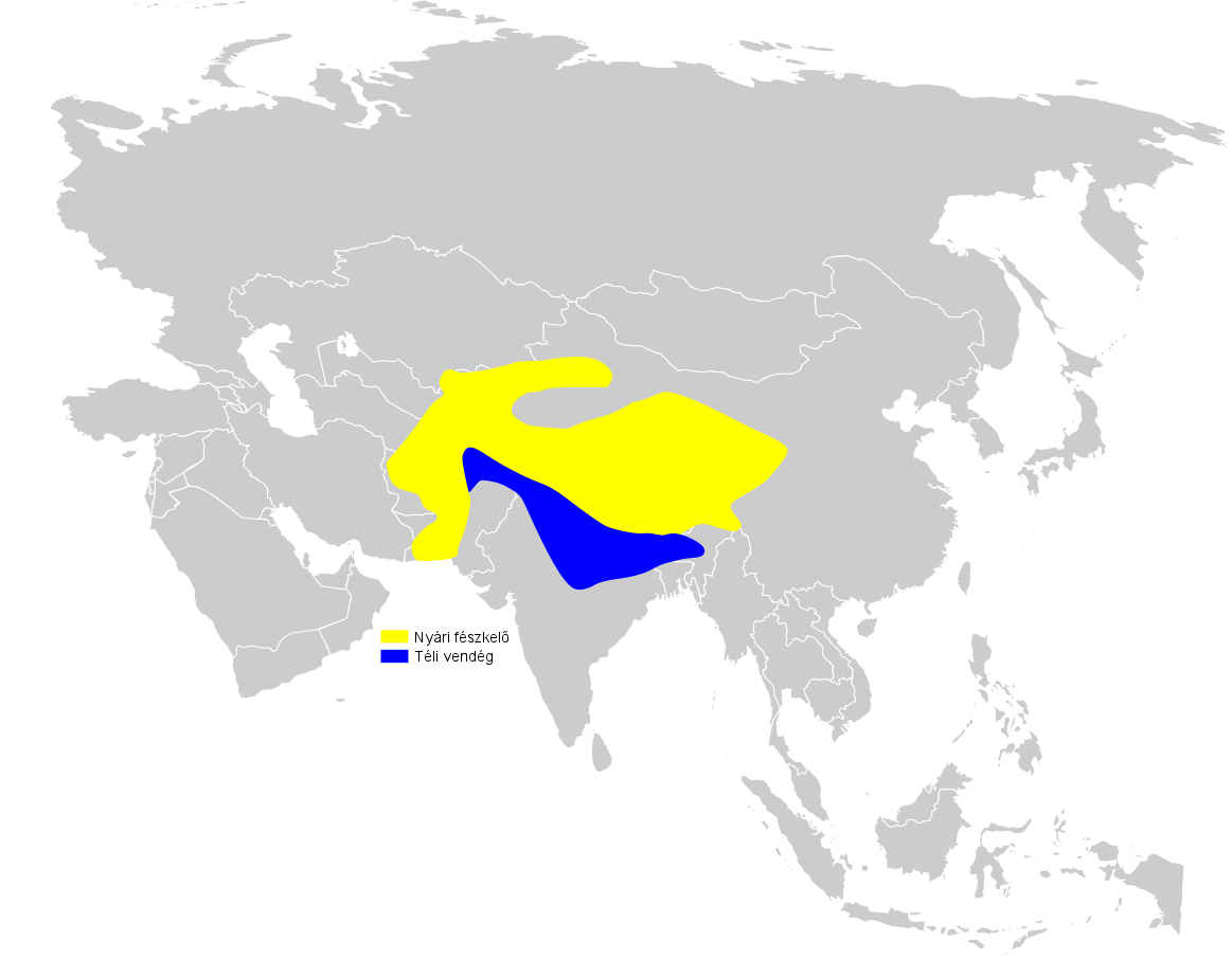 Calandrella acutirostris distribution map, based on